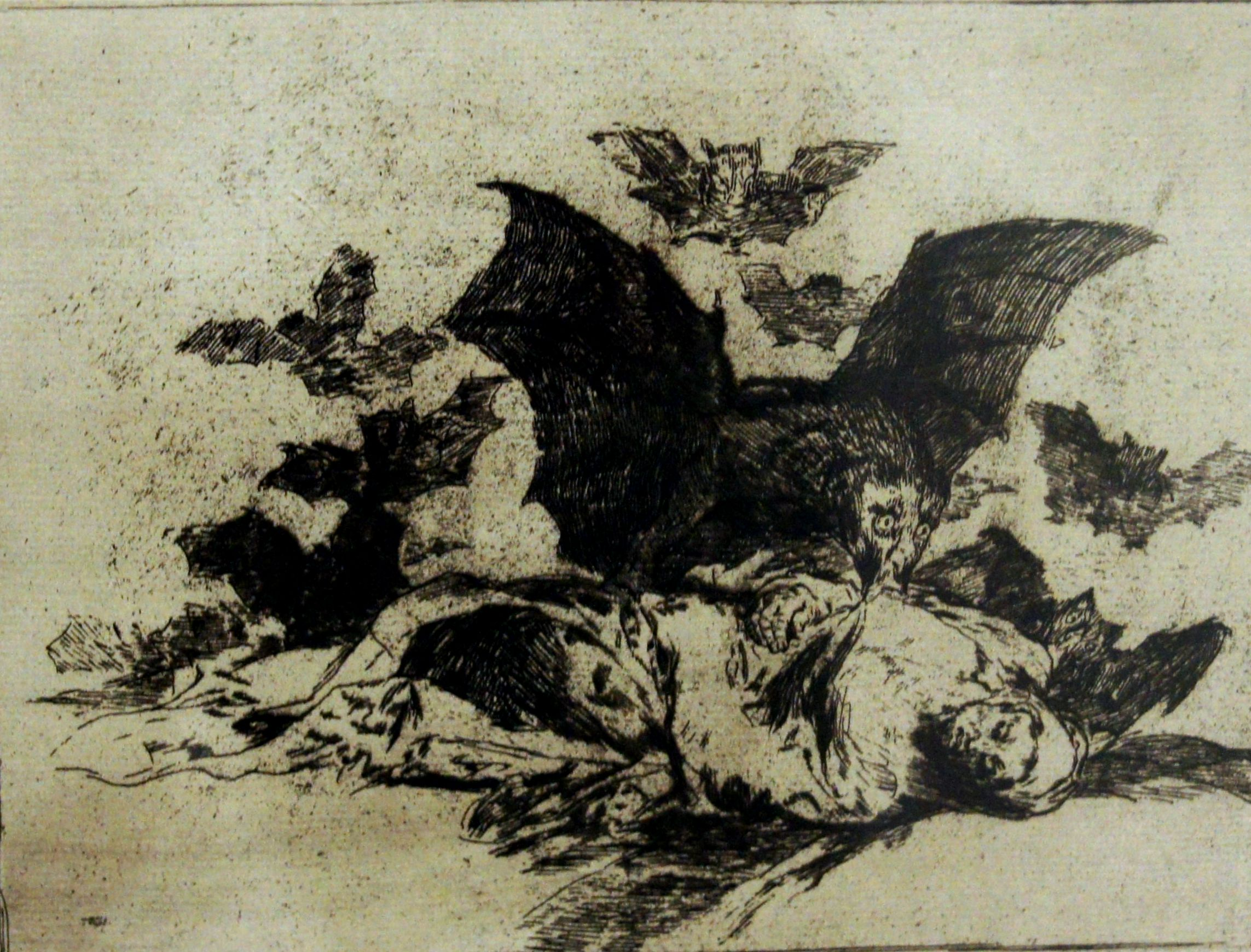 Las resultas. Lámina 72. 179 x 220 mm. Aguafuerte. Un enjambre de extraños murciélagos o vampiros se abaten sobre una figura yacente, acaso muerta, bella y noble en sus harapos, que, como consecuencia de la estampa anterior, se ve picoteada y destrozada por esos avechuchos, el mayor de los cuales, posado sobre el personaje tendido (España acaso) le sorbe la sustancia de su pecho. Esta terrible imagen, de espantosa belleza, parece referirse a los hombres de presa que van a aprovecharse de la restauración femandina para devorar el cadáver de España. La técnica es de una elegancia que puede recordar a los Caprichos y que aumenta lo espantoso de la imagen, de tan rara perfección.